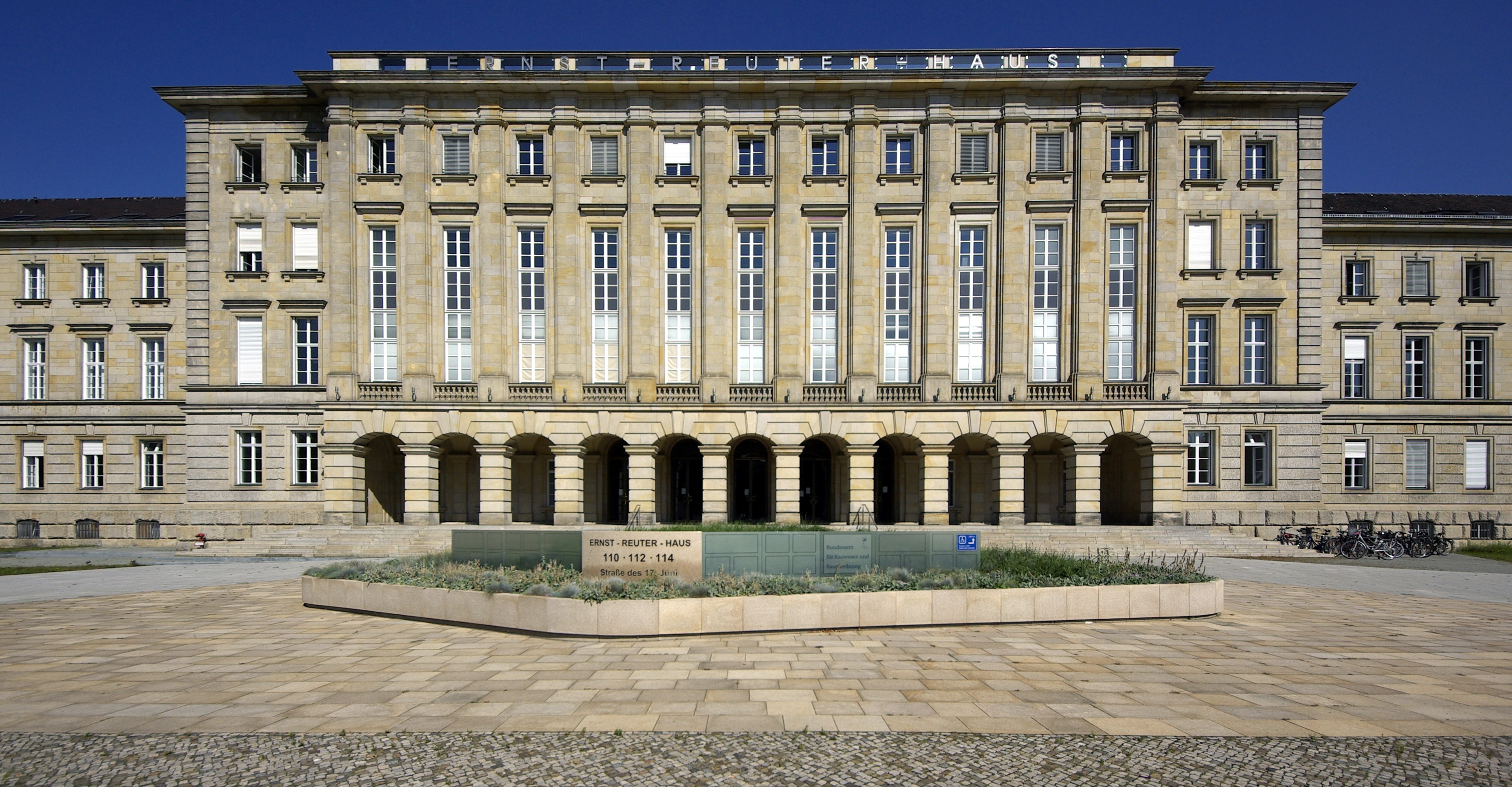 Ernst-Reuter-Haus (früher Deutscher Gemeindetag) in Berlin